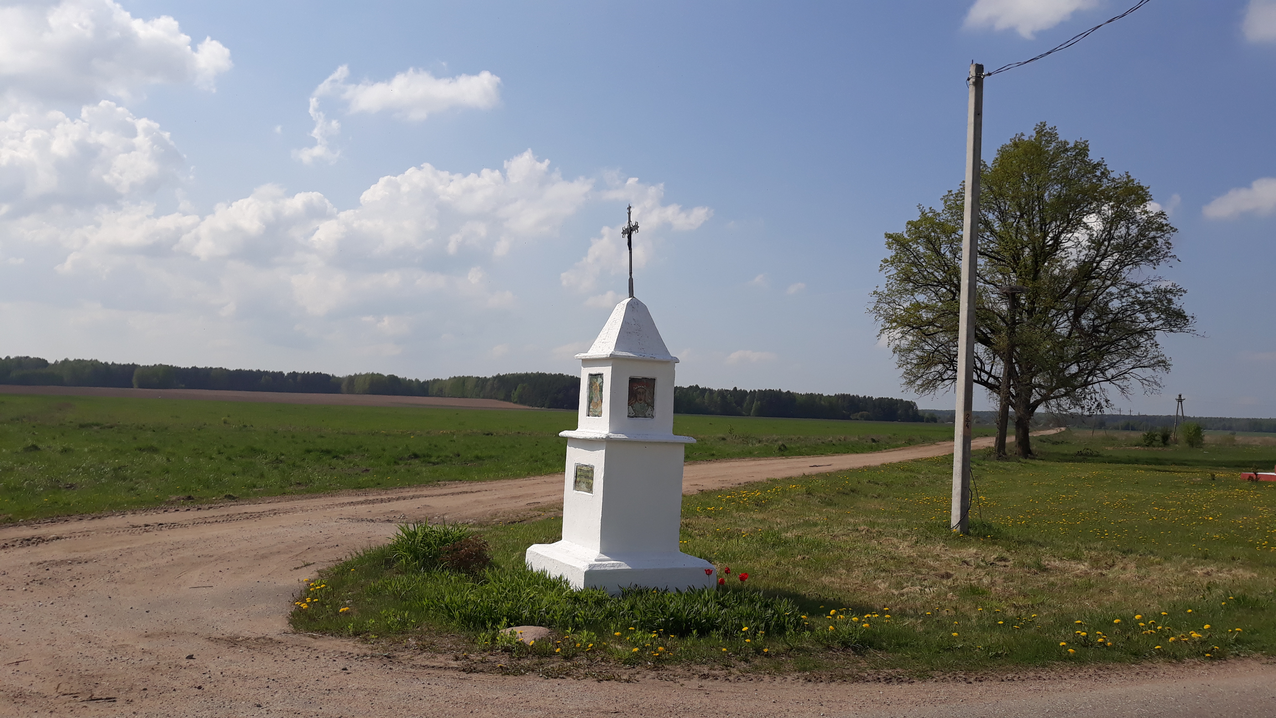 Прыдарожная капліца